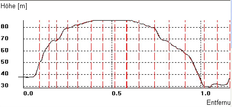 Höhenprofil Schurenbachhalde Essen; links: Westen, rechts: Nord 75 Grad Ost; x-Achse: Entfernung in km; y-Achse: Höhe ü NN in Meter